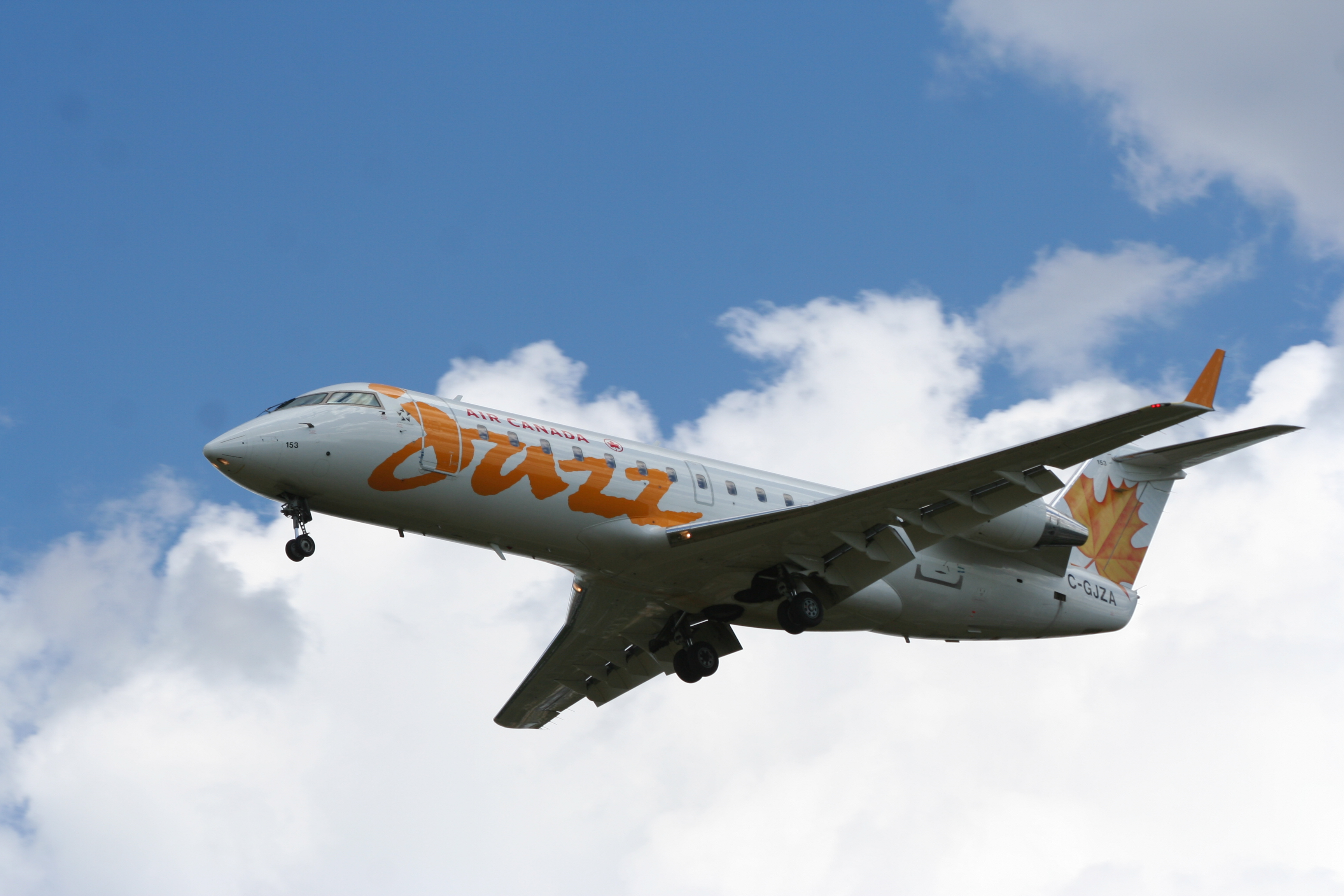 Bombardier RJ in JAZZ colours